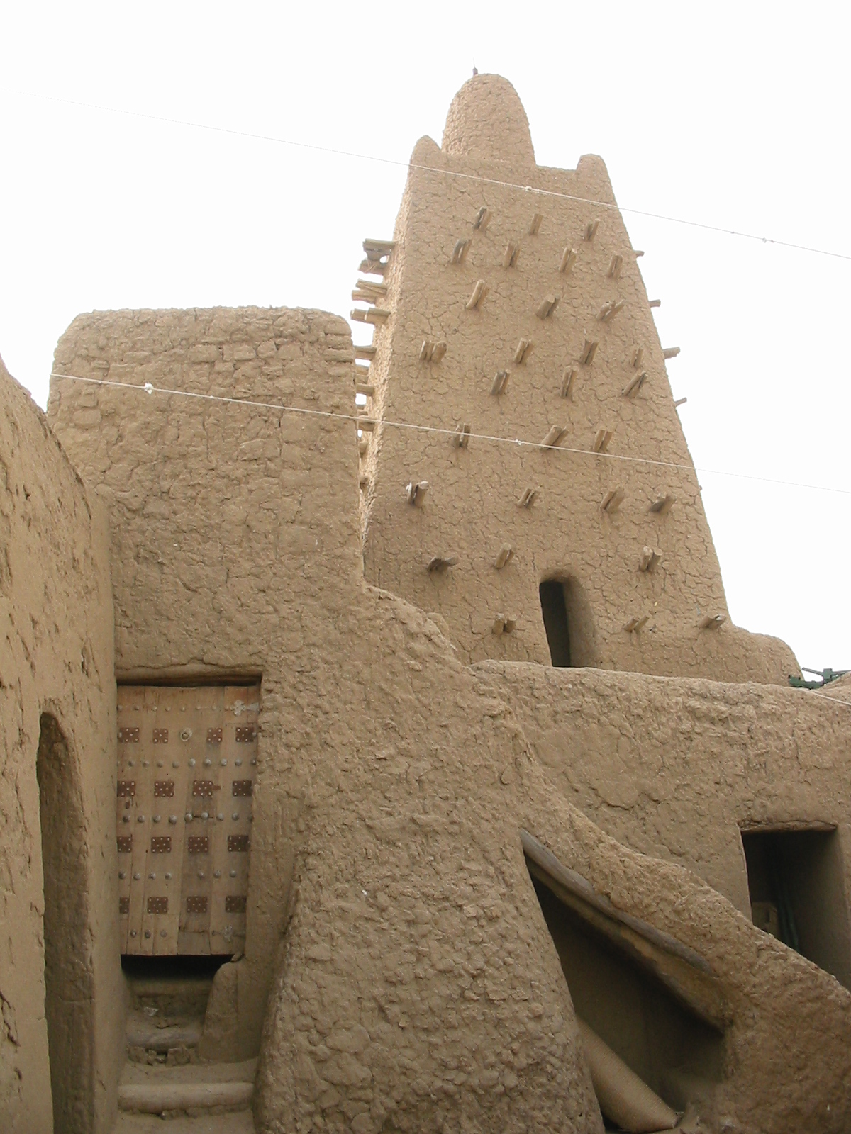 Cour de la mosquée de Djingareiber, Tombouctou